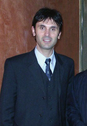 Jorge Mira Pérez